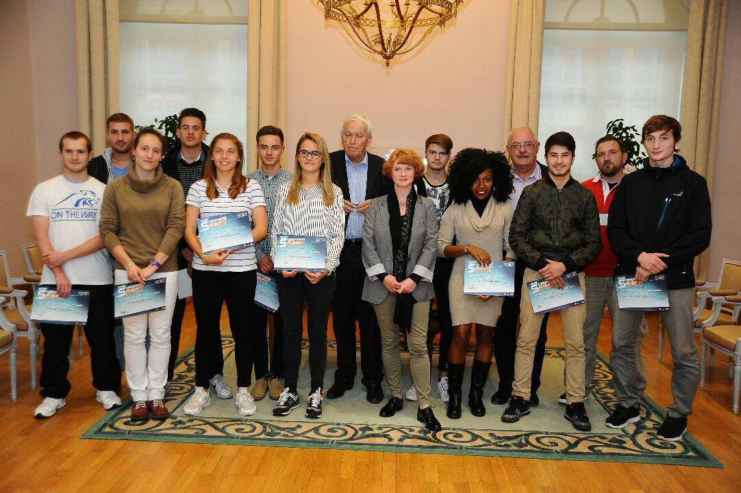 Première promotion des Jeunes Ambassadeurs du Sport du Mans, accompagnée de Jean-Claude Boulard (maire du Mans) et de ses adjoints aux sports (François Edom) et à la jeunesse (Elen Debost).